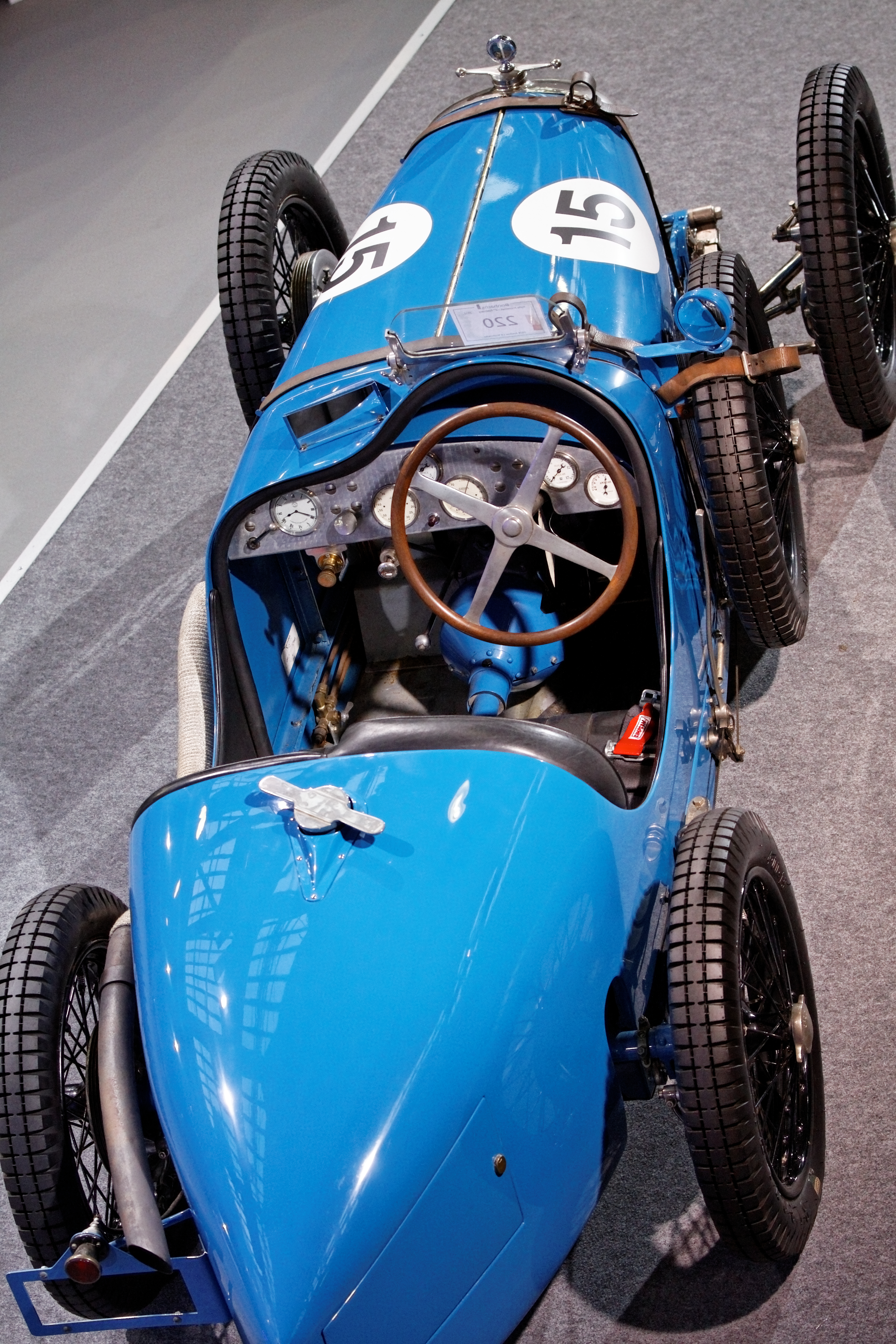 Amilcar C6 Voiturette